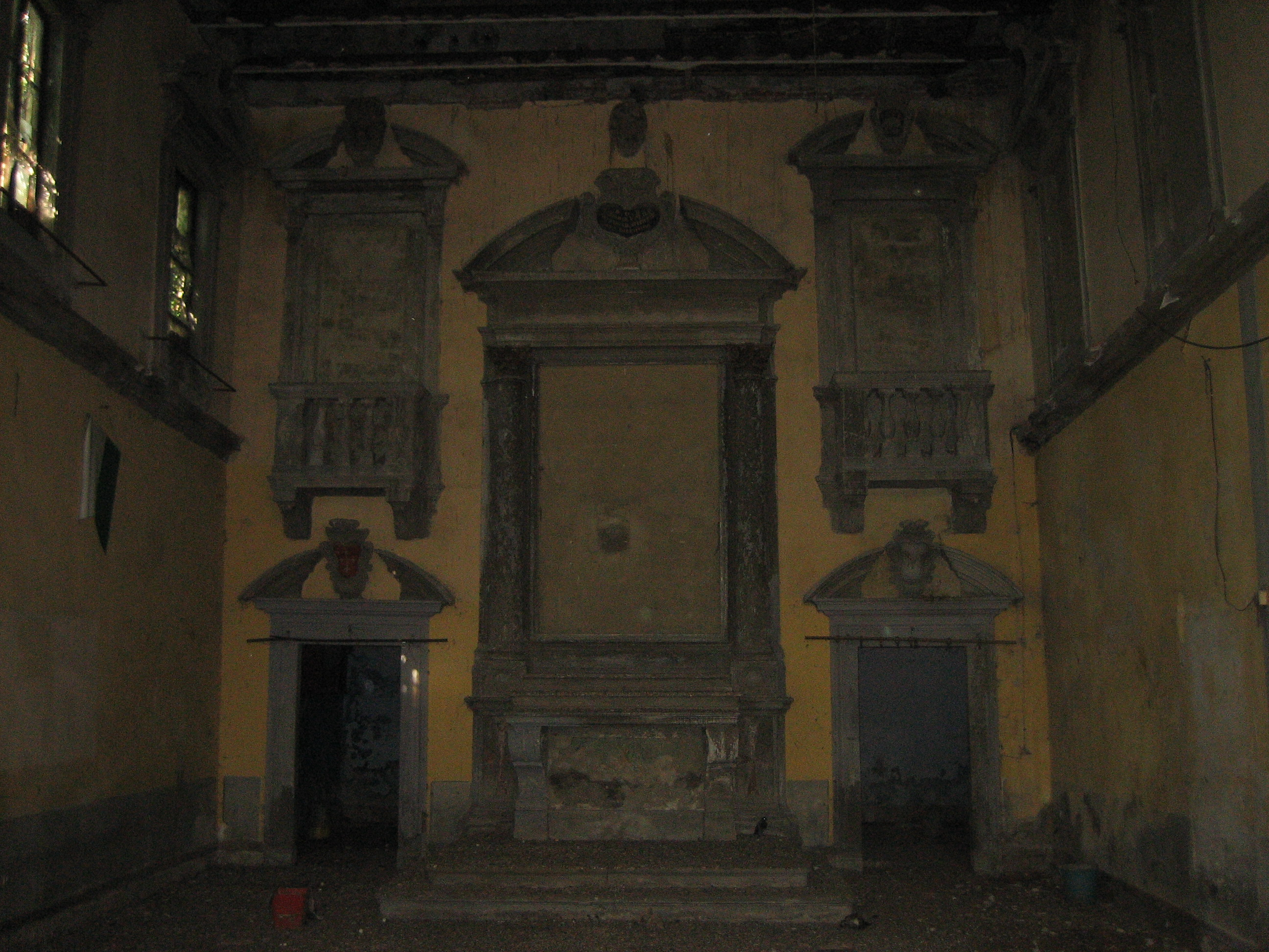 Foto della parete d'altare con le due aperture in basso che collegano alla sacrestia e i due affacci tamponati con balcone al primo piano